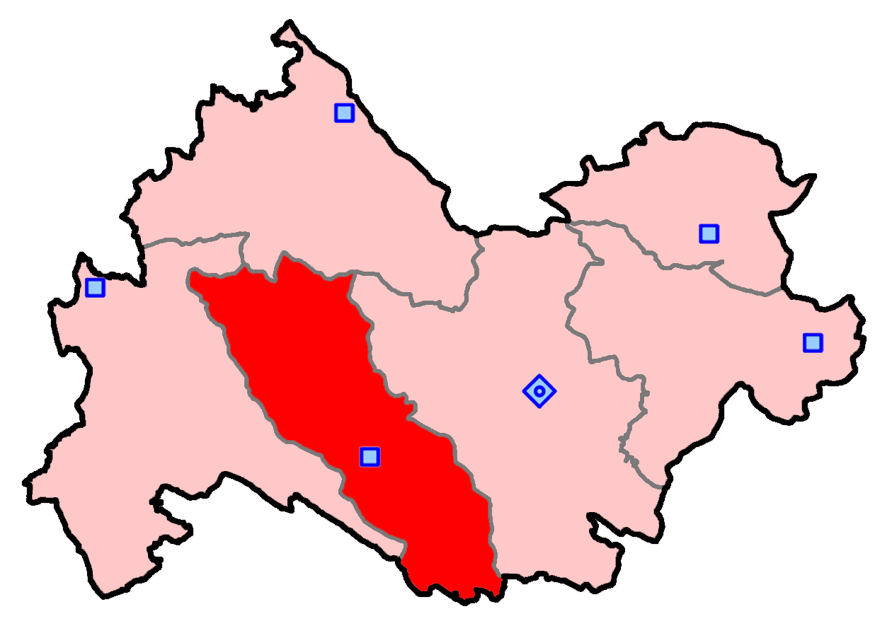 حوزه‌ اسلام آباد غرب برای انتخابات مجلس شورای اسلامی